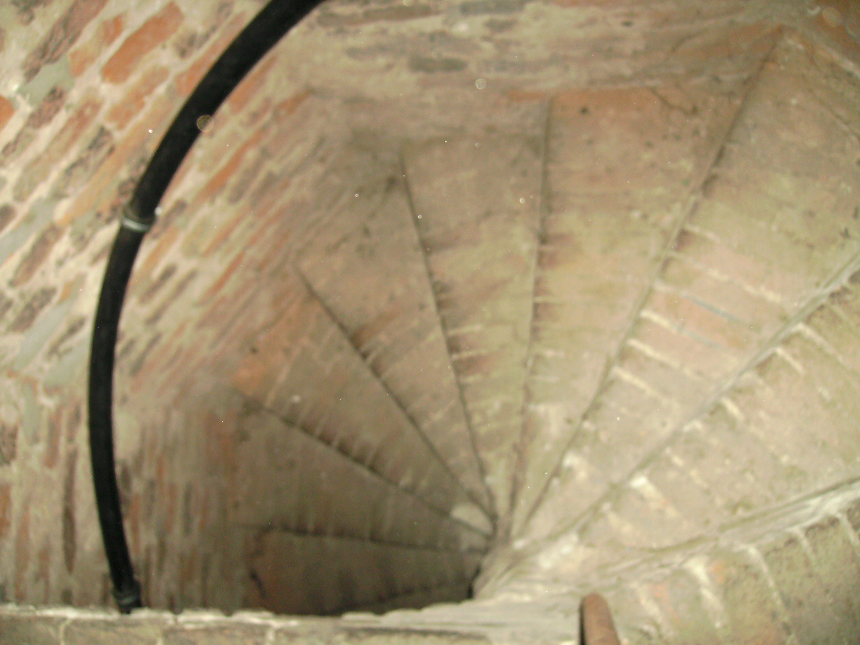 Treppenturm der Alten Kirche in Kellen